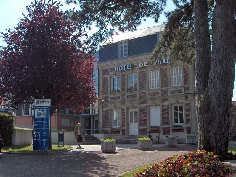 Ancien Hotel de ville de Bihorel (76420)photo personnelle de juin 2006